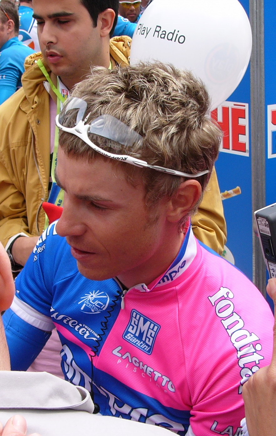 Damiano Cunego at Giro d'Italia 2006